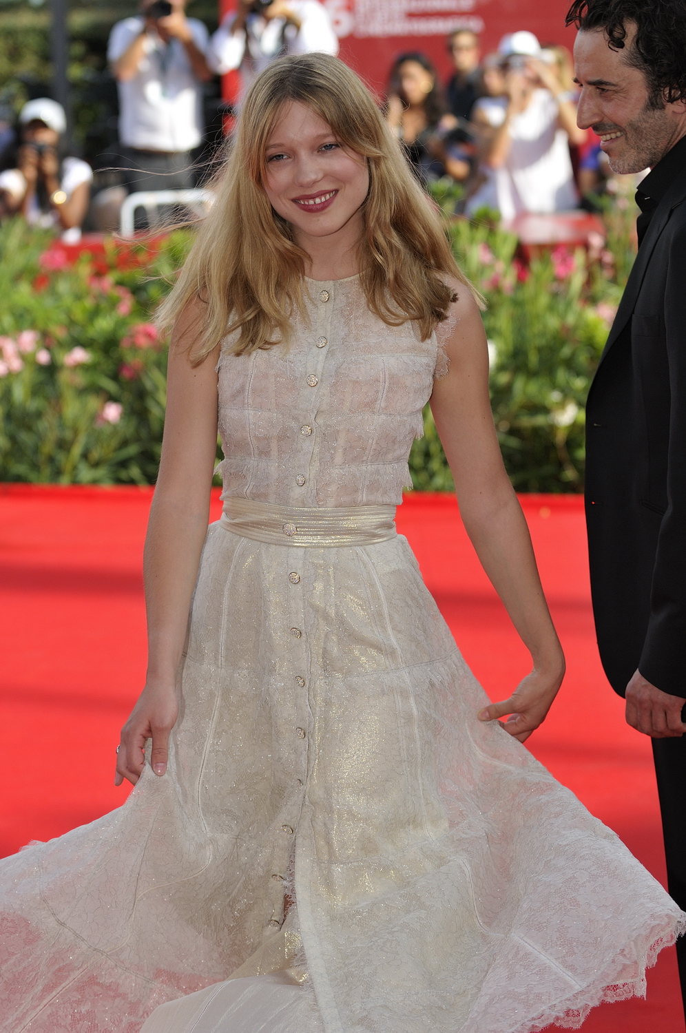 66ème Festival du Cinéma de Venise (Mostra), 3ème jour (04/09/2009) Photocall avec Léa Seydoux, Bruno Todeschini, Jessica Hausner (Réalisateur) pour le film : Lourdes